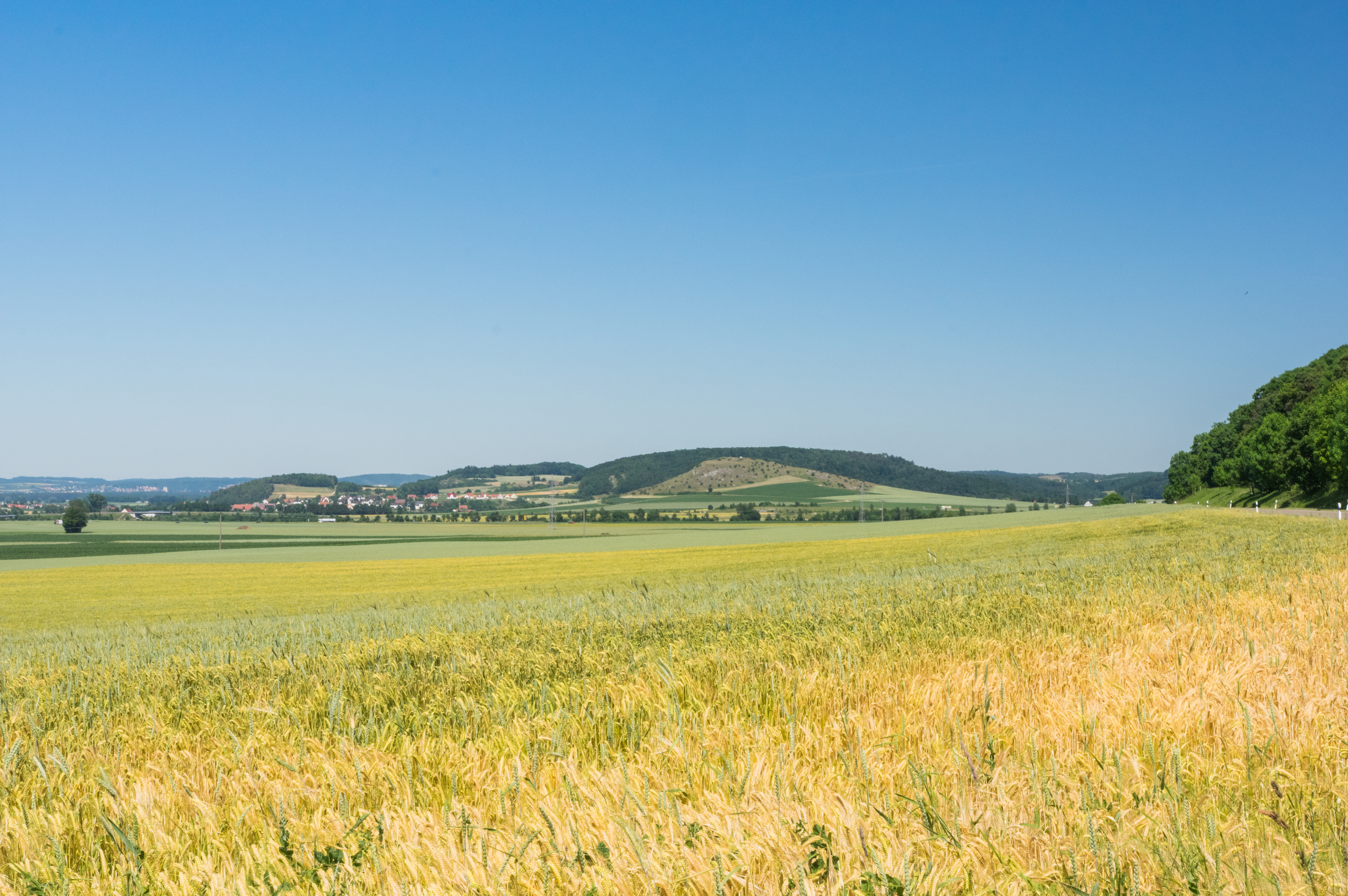 Blickrichtung Südost zum Heroldinger Burgberg mit dem Rollenberg davor, links der Ortsteil Heroldingen